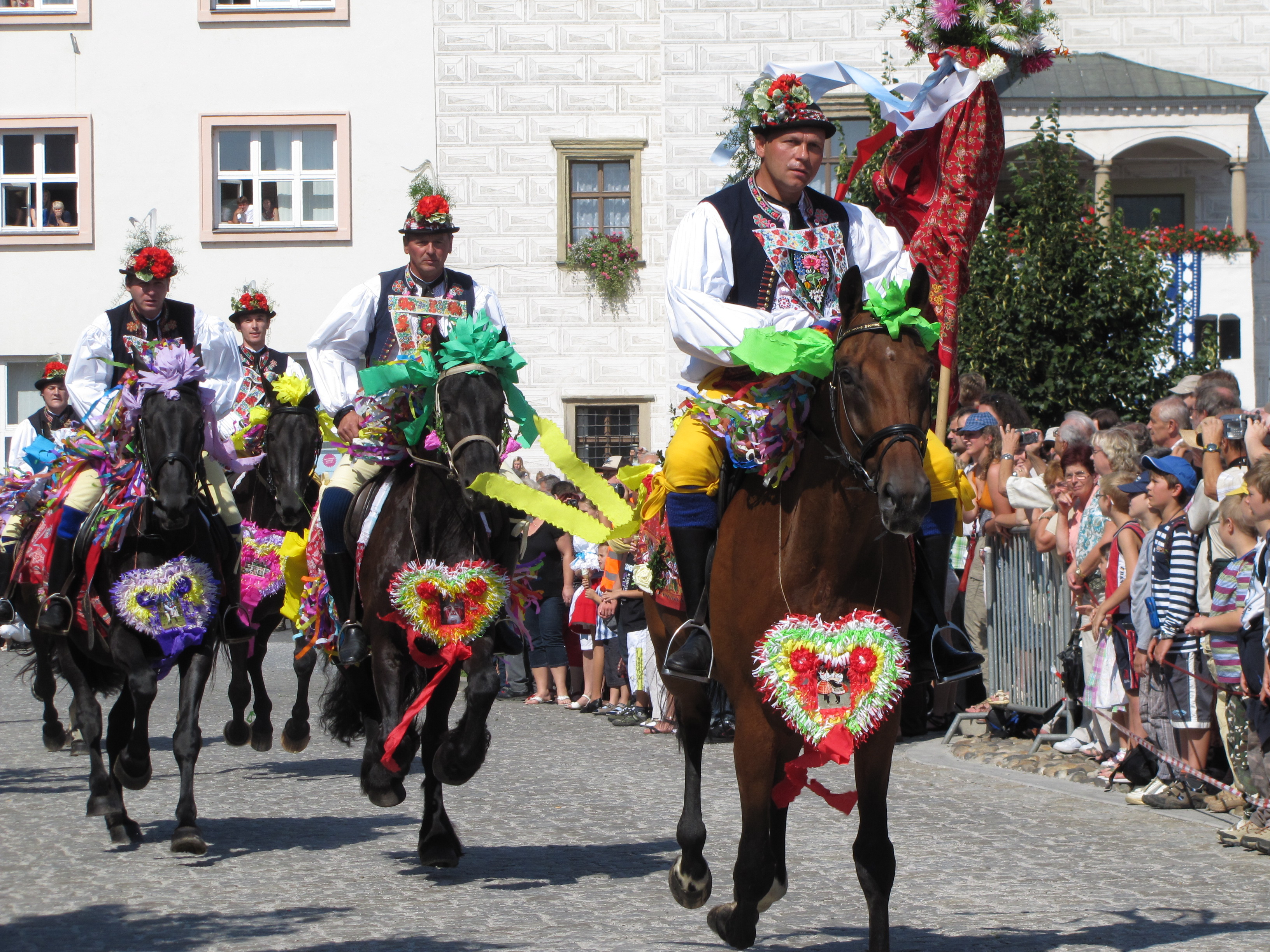 Jízda králů na Slováckém roku 2011 v Kyjově